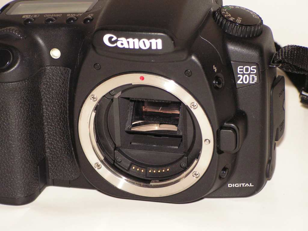 Gehäuse einer Digital-Spiegelreflexkamera mit sichtbarem Schwingspiegel